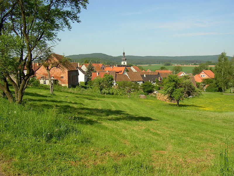 Schweinshaupten